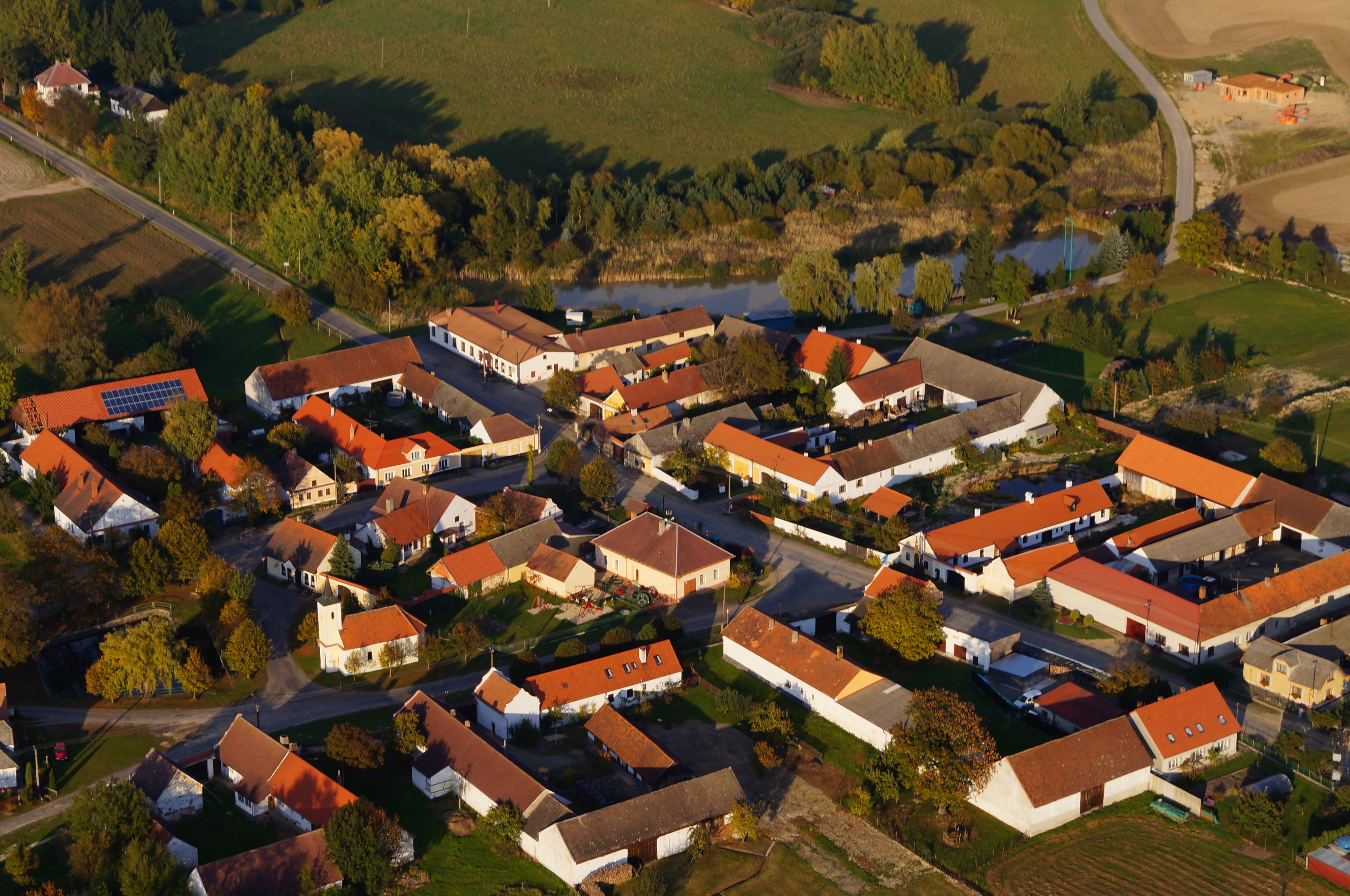 Kaple návesní (Komárov), Komárov